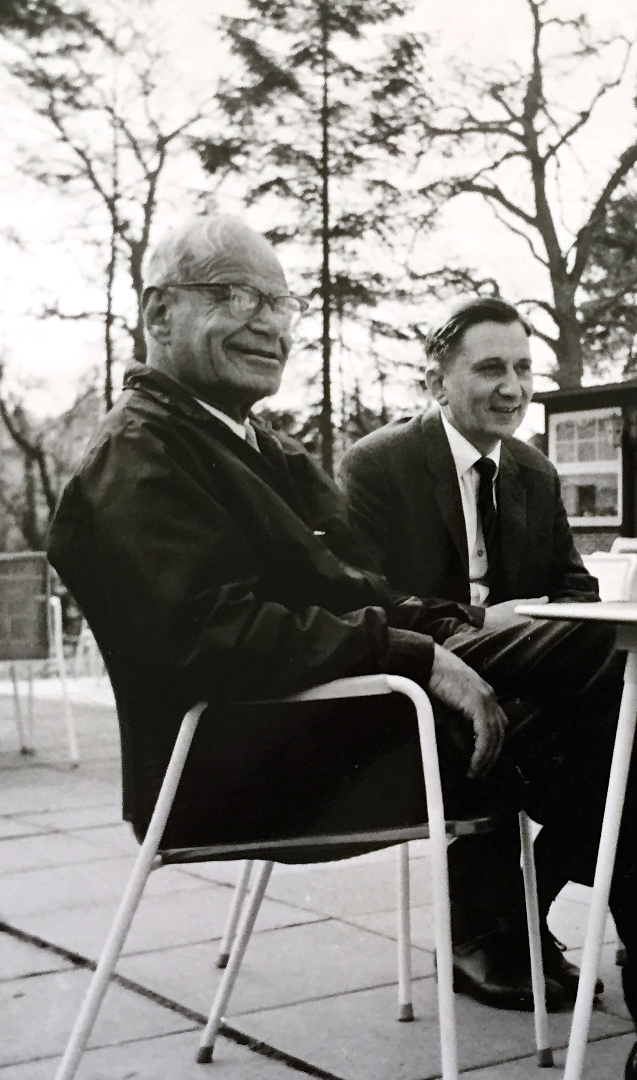 Curt Bondy, erster v.l.